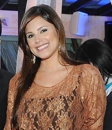 La modelo dominicana Renata Soñé.